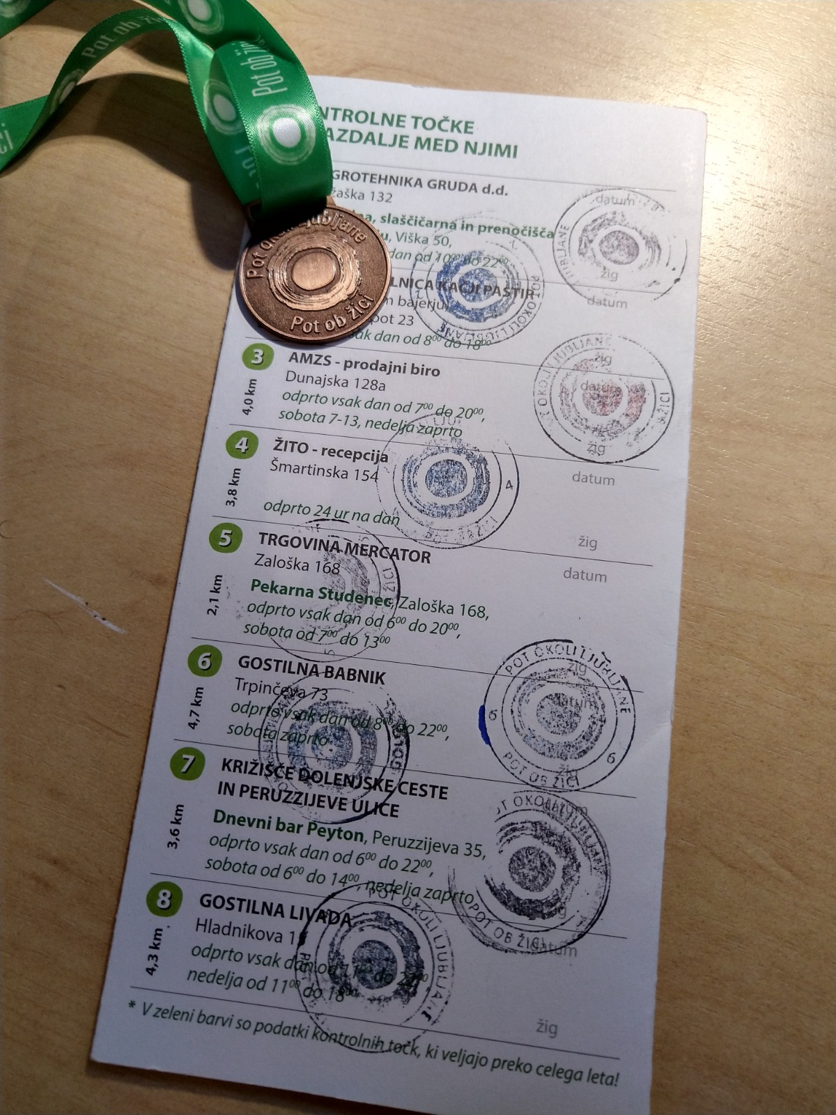 Fotografija kontrolnega kartončka z žigi kontrolnih točk posti spominov in tovarištva in medalje za opravljen en krog. Izpolnjen 9. 5. 2020